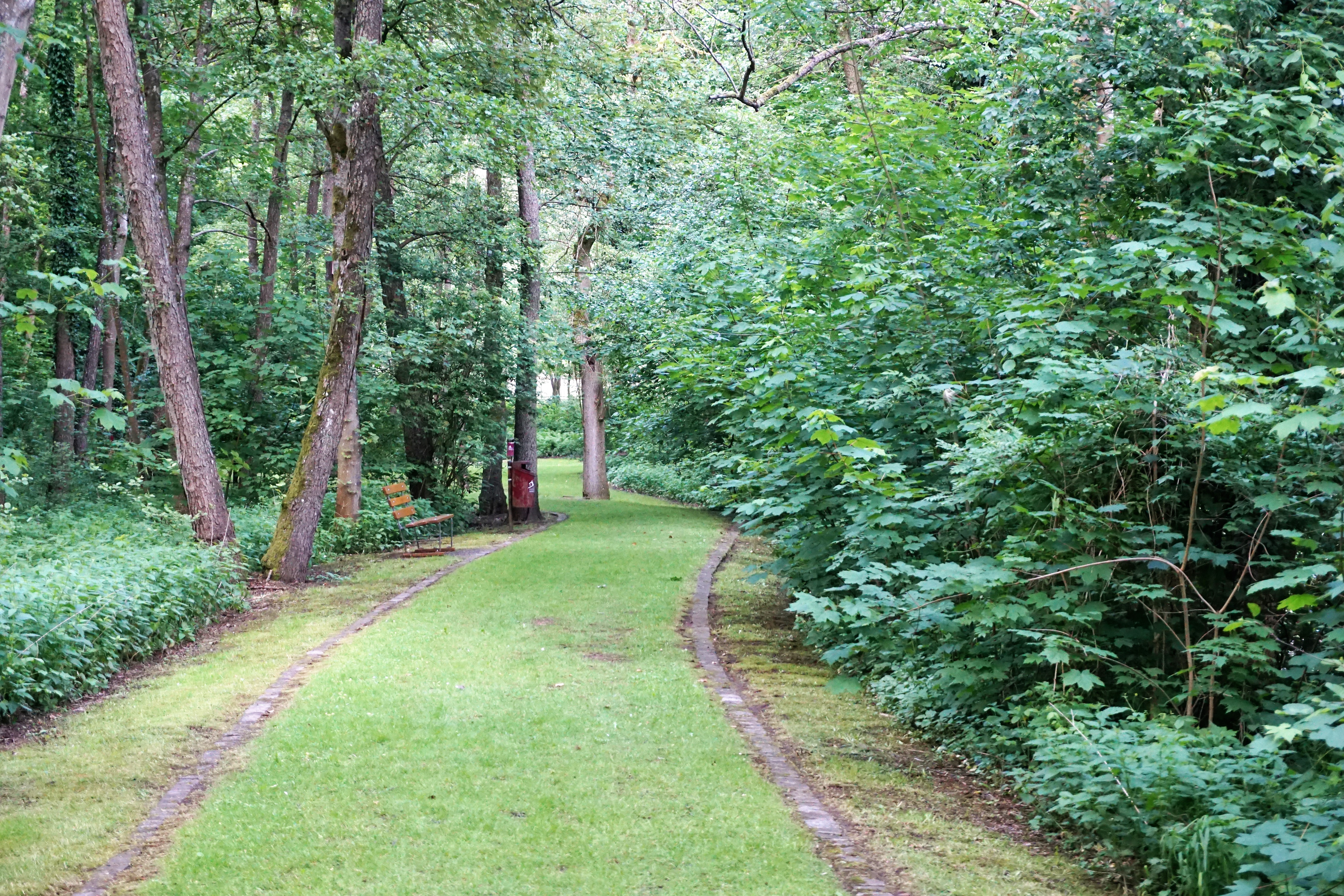 Luxembourg, Dommeldange. Sentier au Parc Collart.